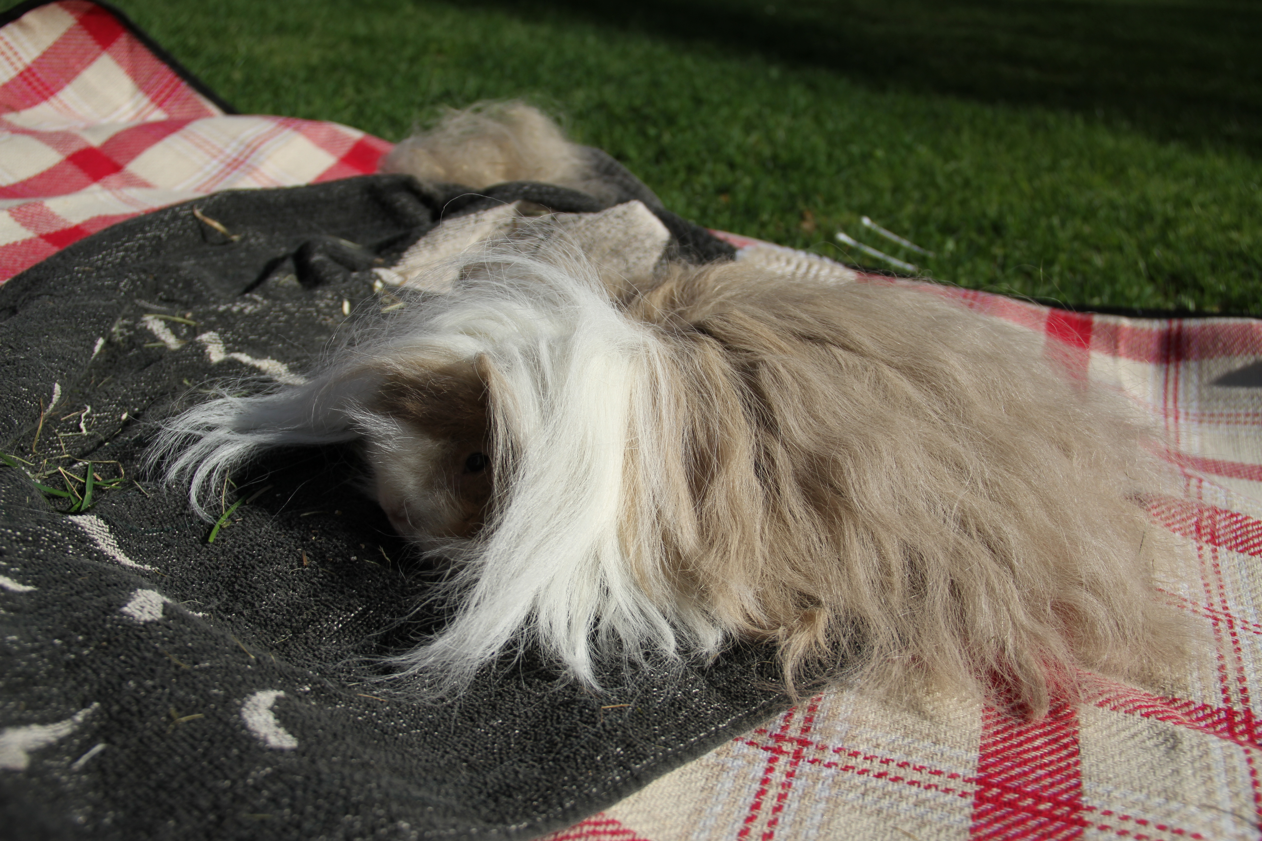 Lillhagas Zoran, ett marsvin av rasen Lunkarya